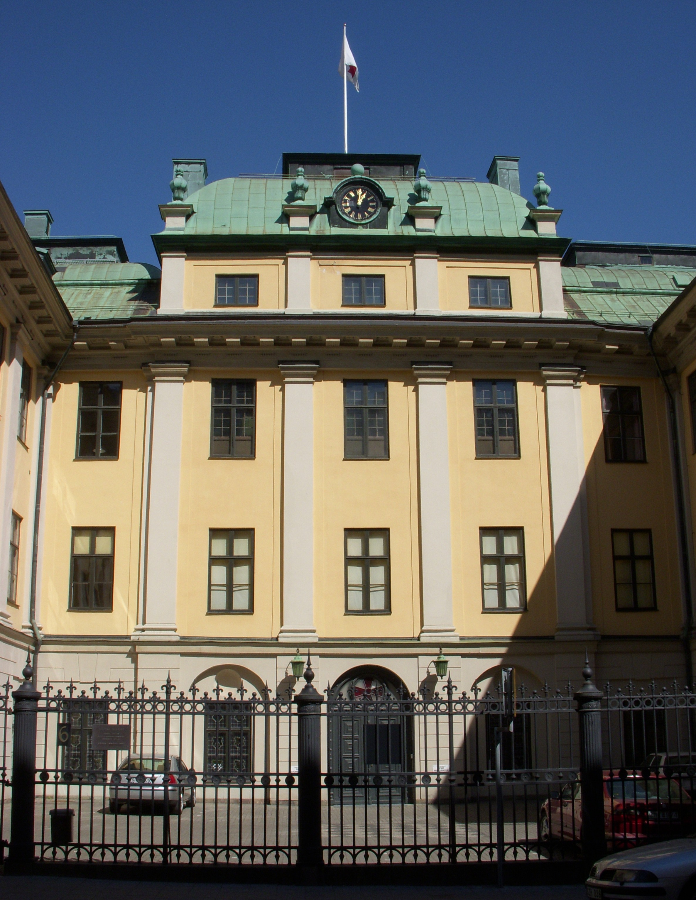 Bååtska palatset på Blasieholmen i Stockholm